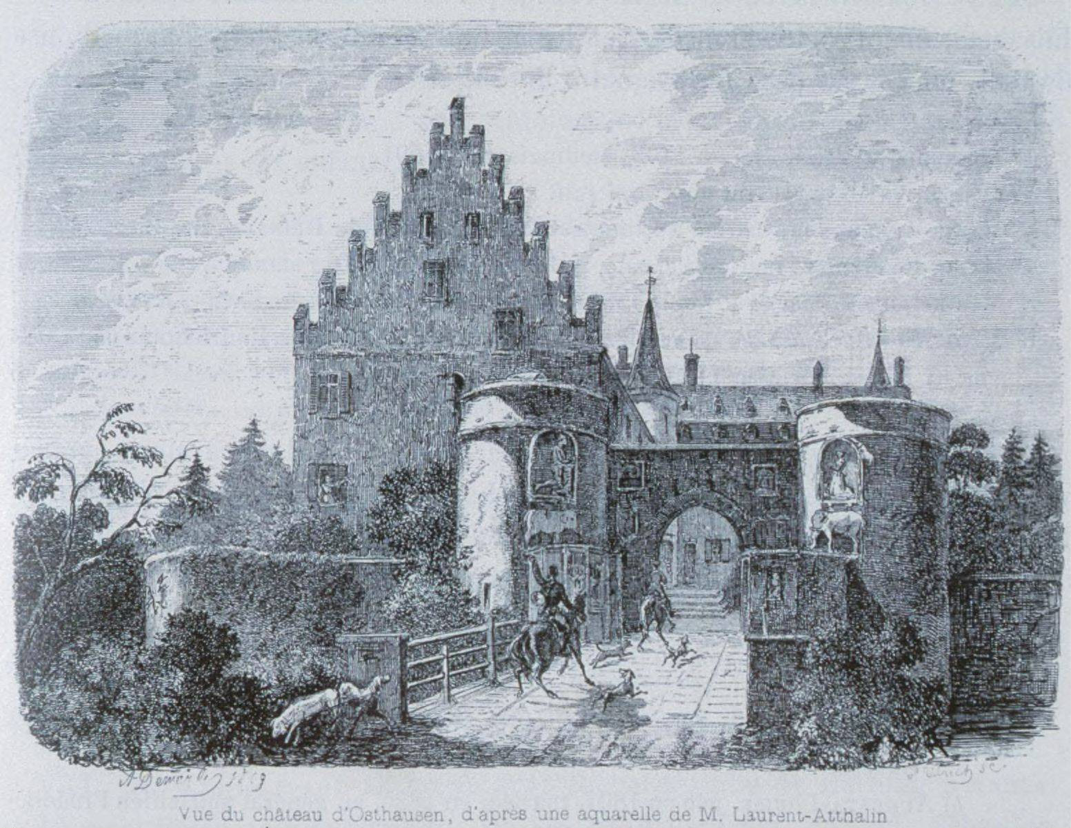 Stich mit der Abbildung des Schlosses Osthausen